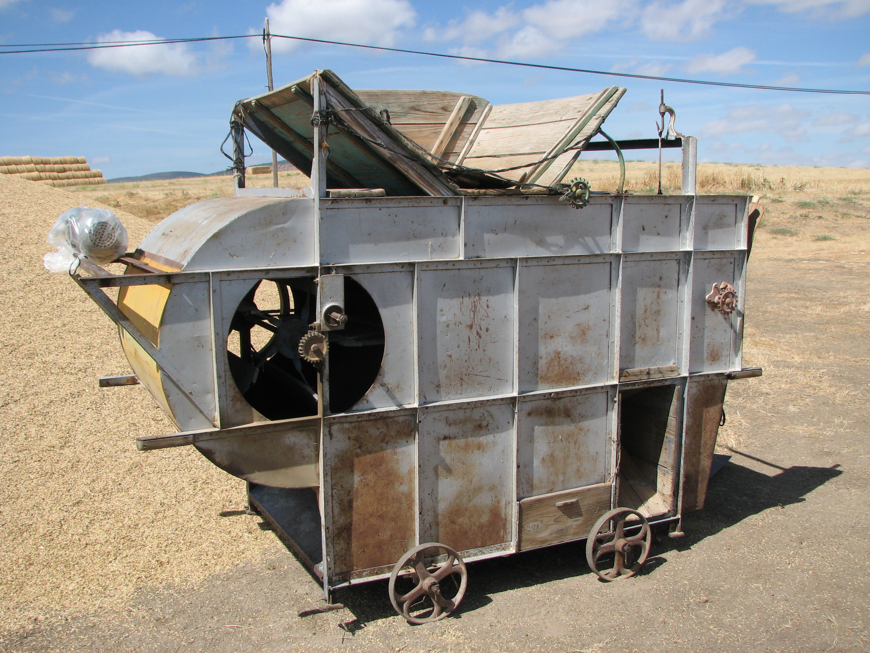 Aventadora o Beldadora. Agricultura. España. Castilla y León. Ávila. Santo Tomé de Zabarcos.